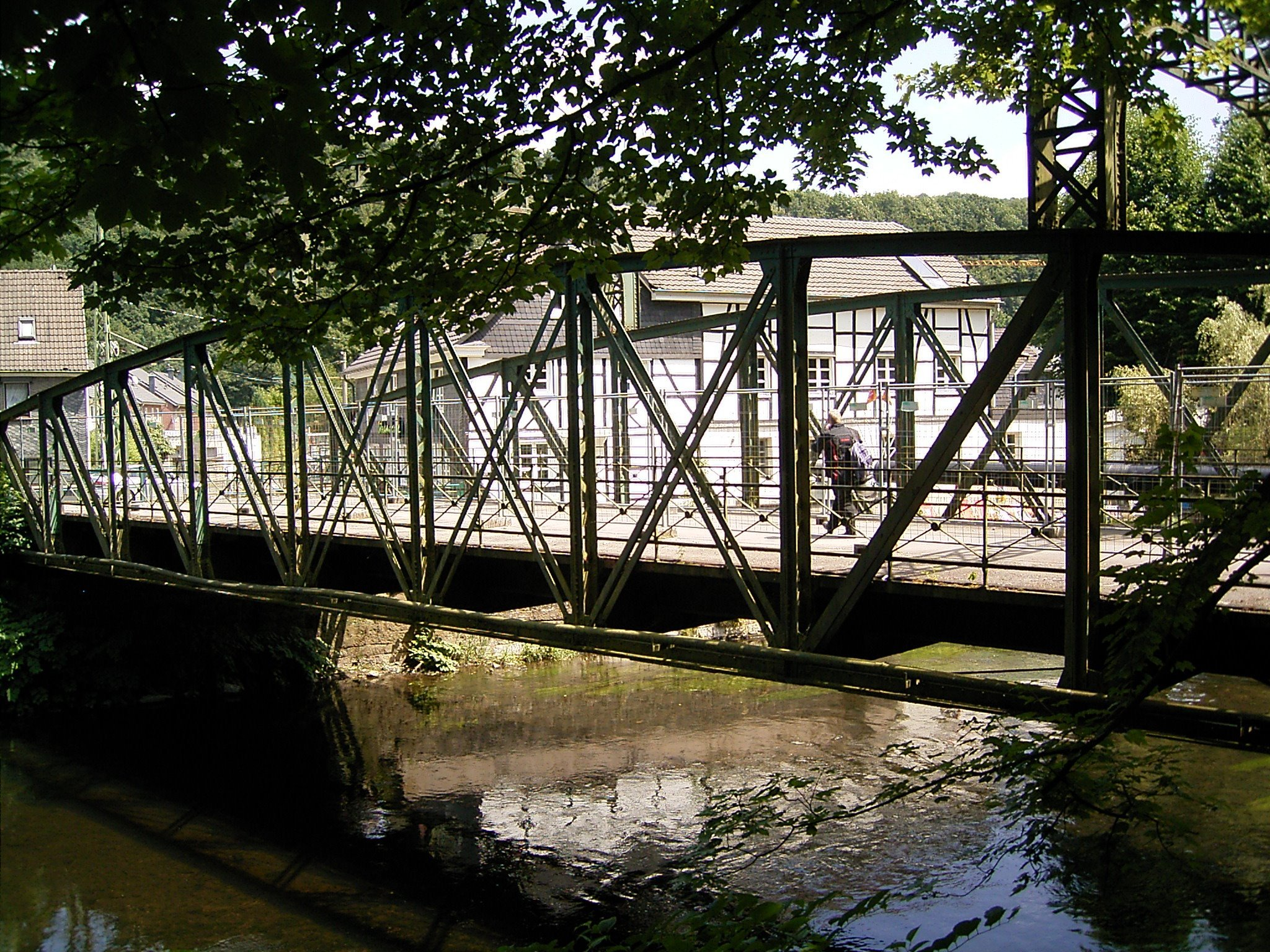 Kohlfurther Brücke über die Wupper in Wuppertal / Solingen